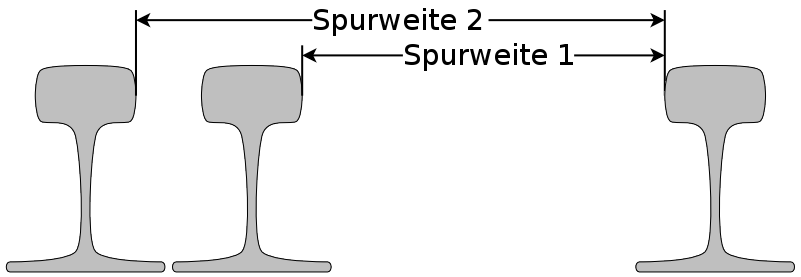 Darstellung der Spurweiten bei einem Dreischienengleis * Zeichnung selbst erstellt *